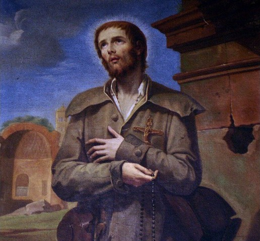 Photographie d'un tableau représentant Benoît Joseph Labre (église d'Amettes)